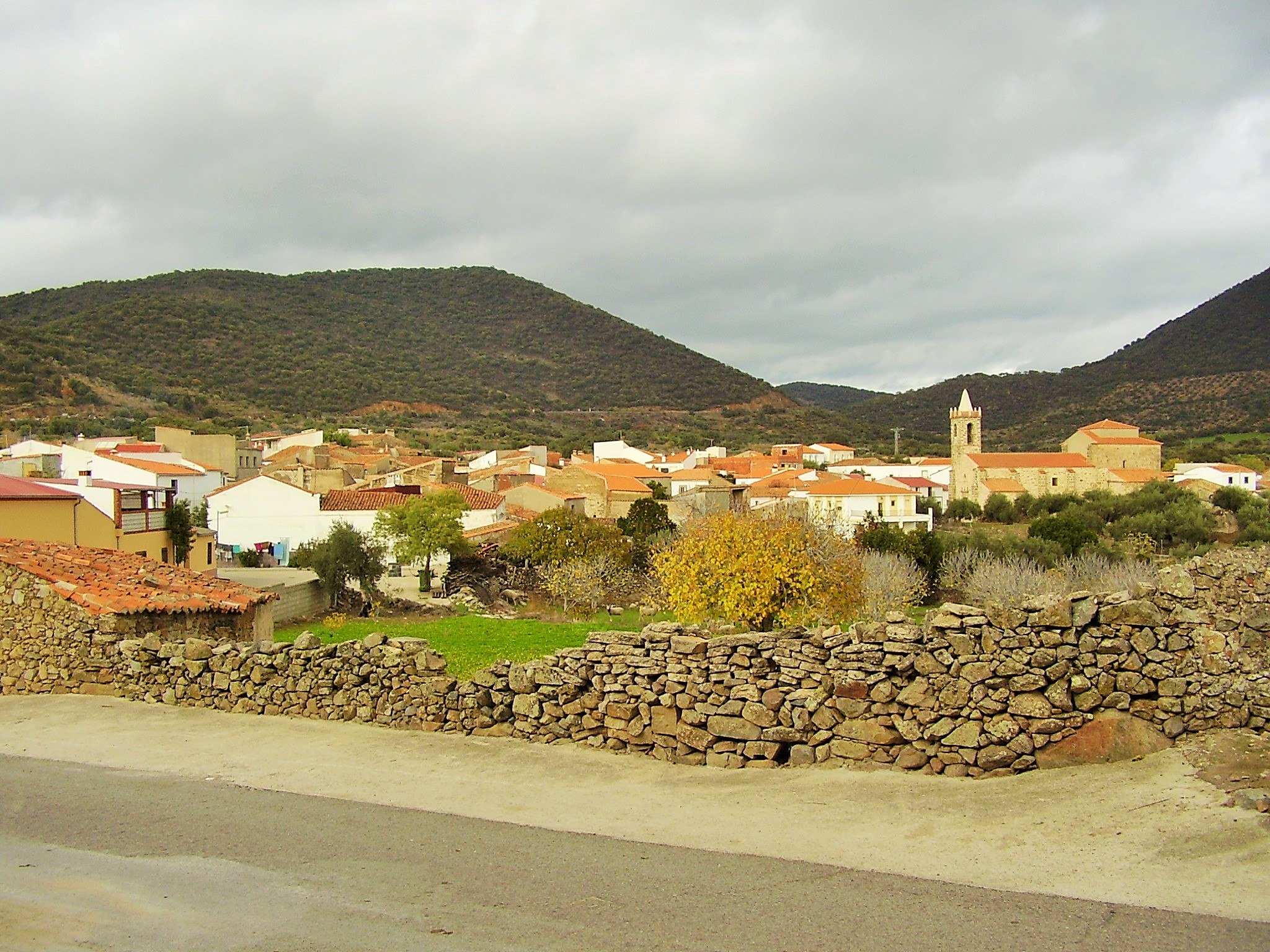 Panorámica de la población. Cáceres